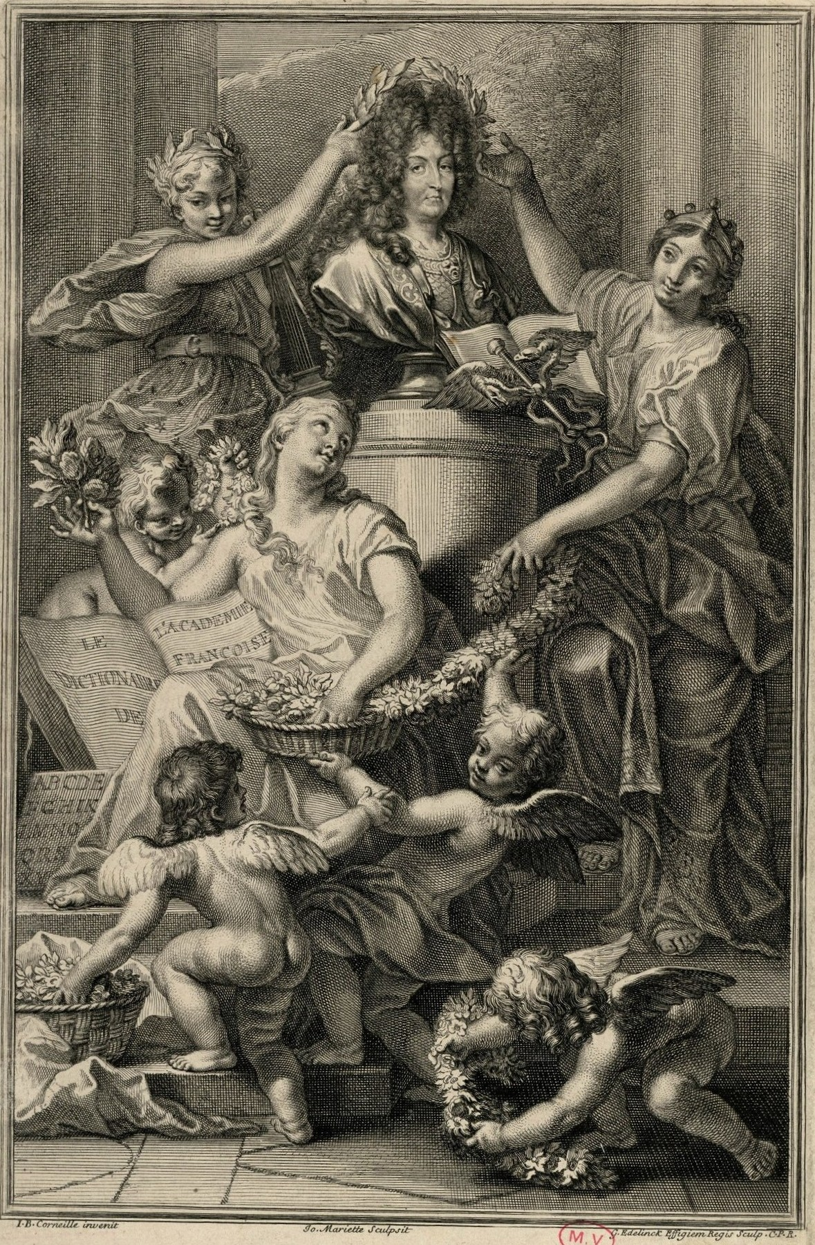 Frontispice du Dictionnaire de l'Académie Française pour la première édition du Dictionnaire de l'Académie en 1694. Estampes. Dimensions : 36,4 x 23,5 cm. Matière et technique : burin.